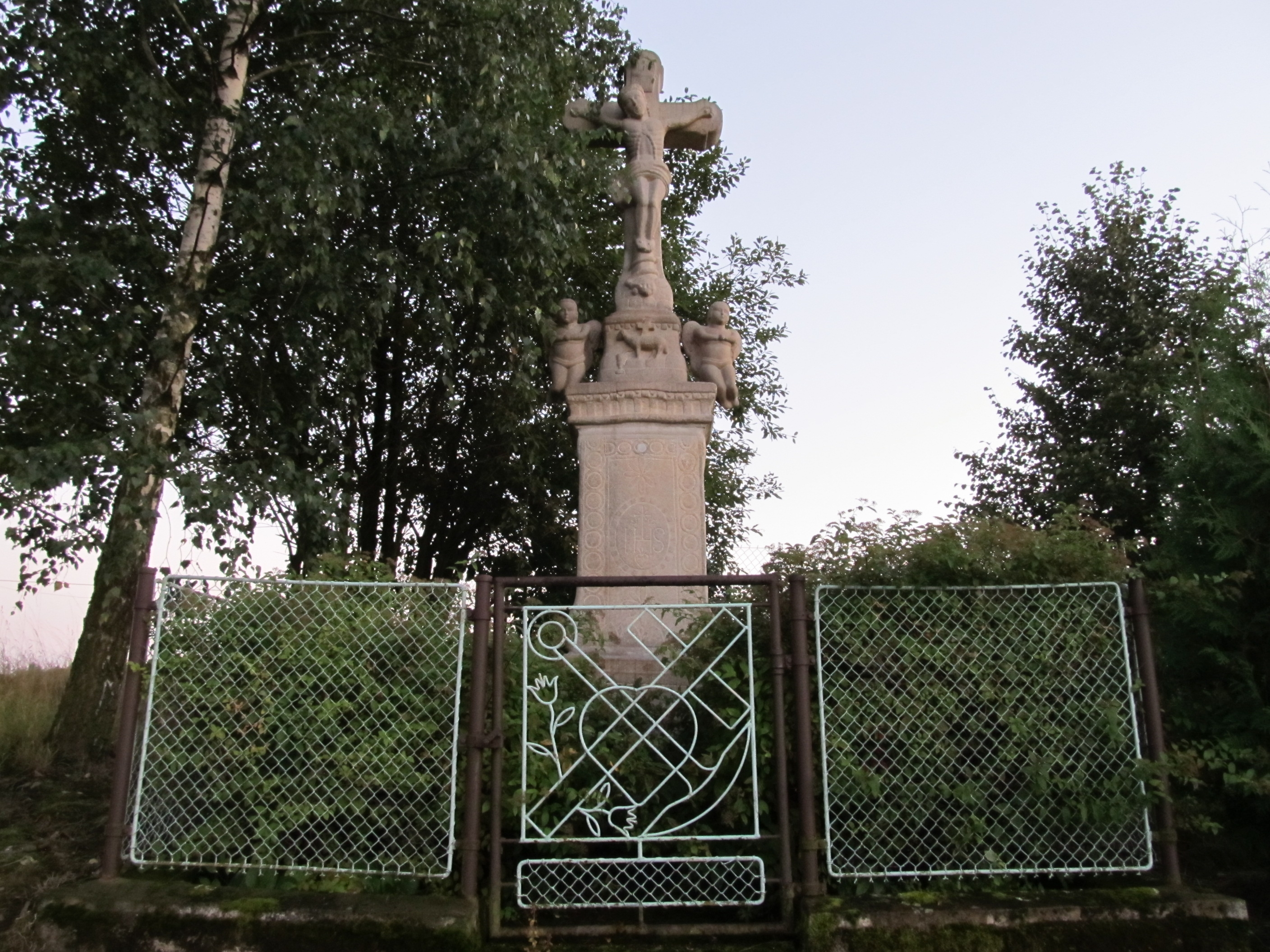 Krucifix (Trubějov), proti čp. 37, Trubějov